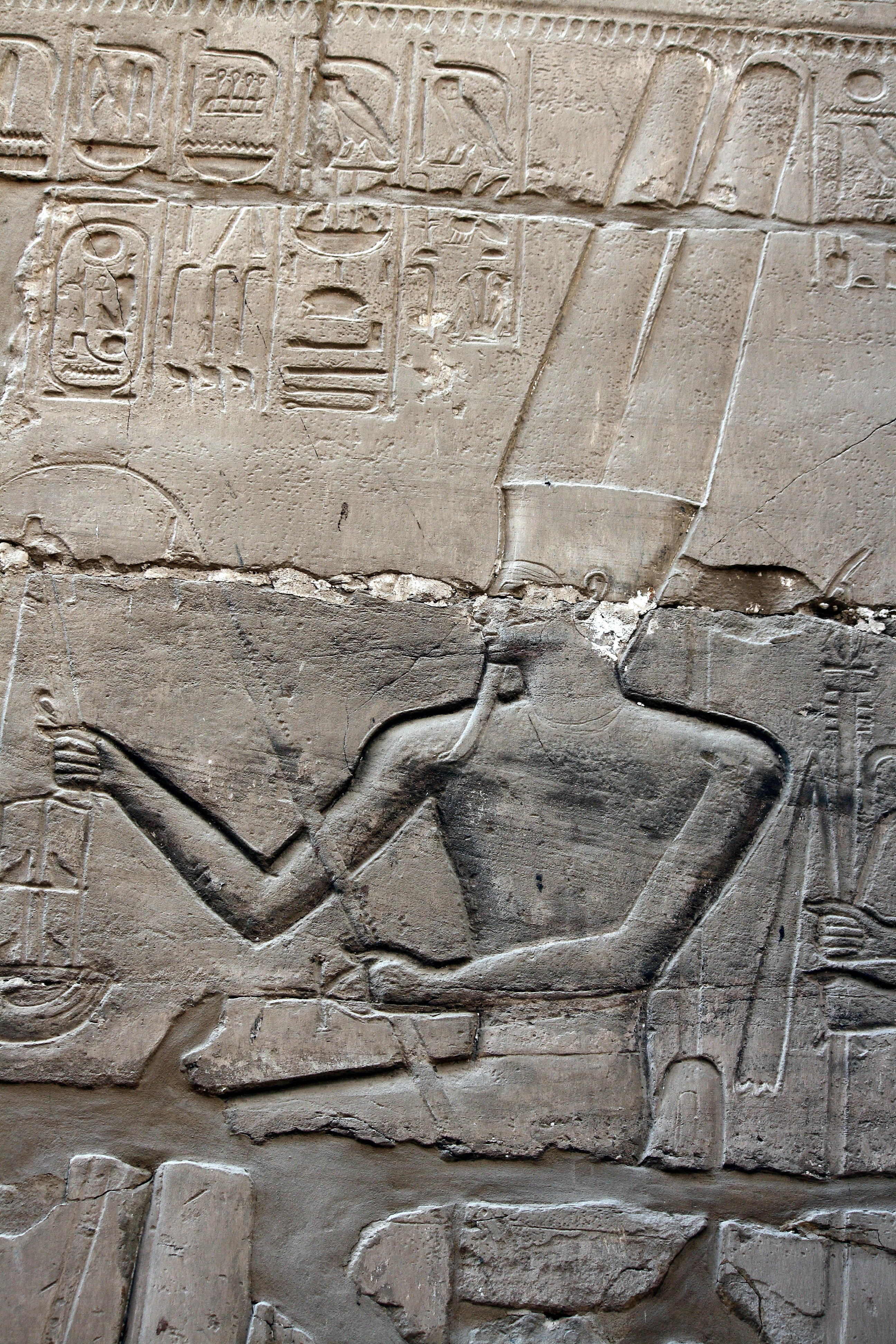 Karnak_temple, Großer_Säulensaal, Relief